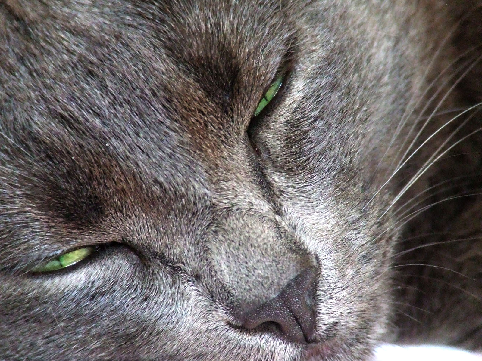 Salsiccia, una delle vigilanti che sorvegliano un Wikipediano. Indovinate di cosa è ghiotta...